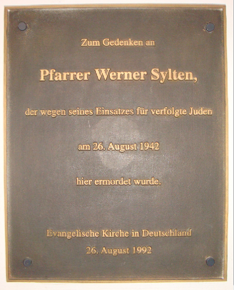 Gedenktafel der EKD im Innenhof der Gedenkstätte - Ostseite